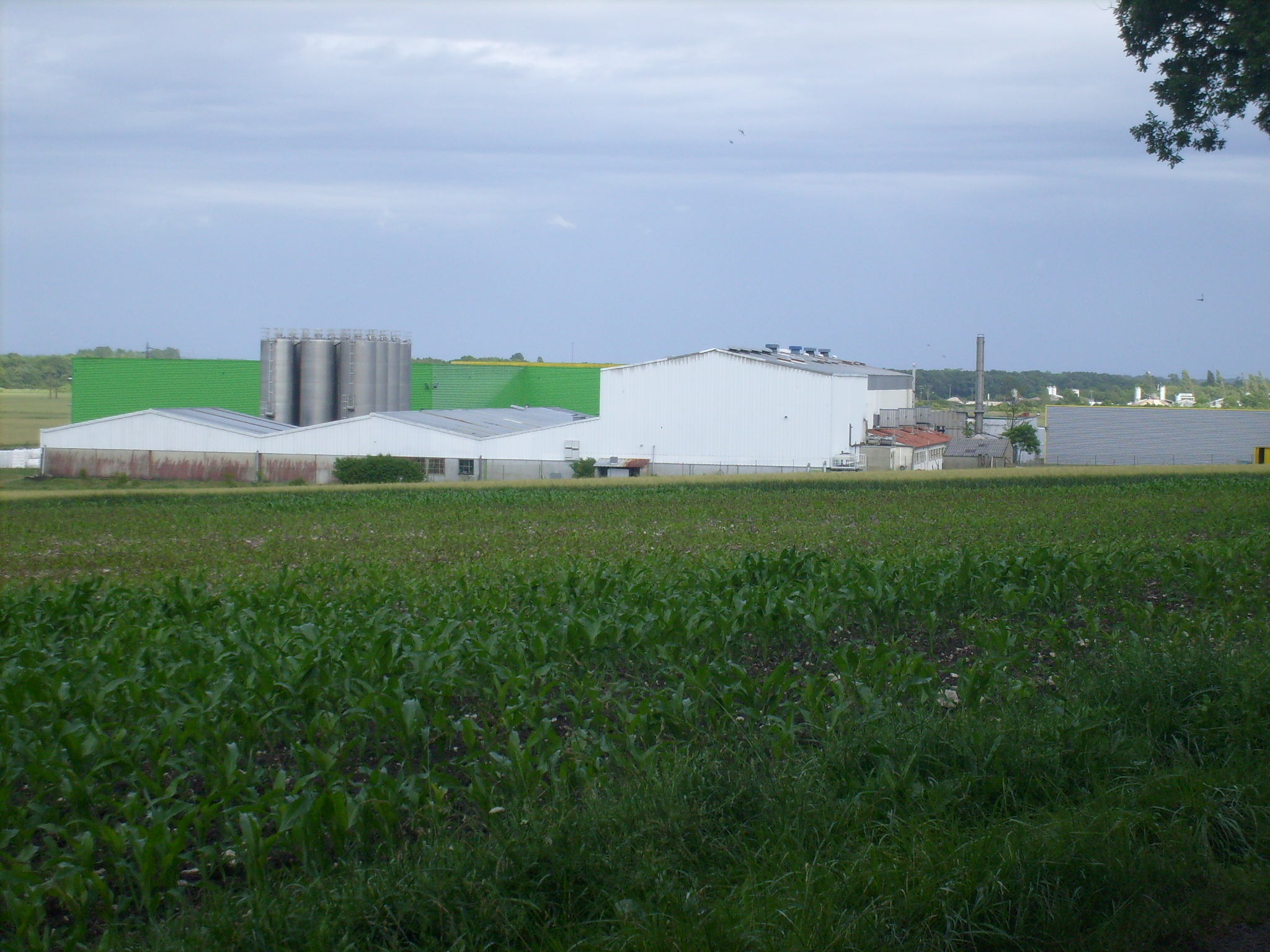 Zone d'activité de l'Orignade à Médis (Charente-Maritime)